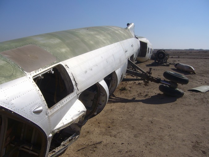 A junked Iraqi Tu-22 "Blinder" fuselage at Al Taqaddum, Iraq..